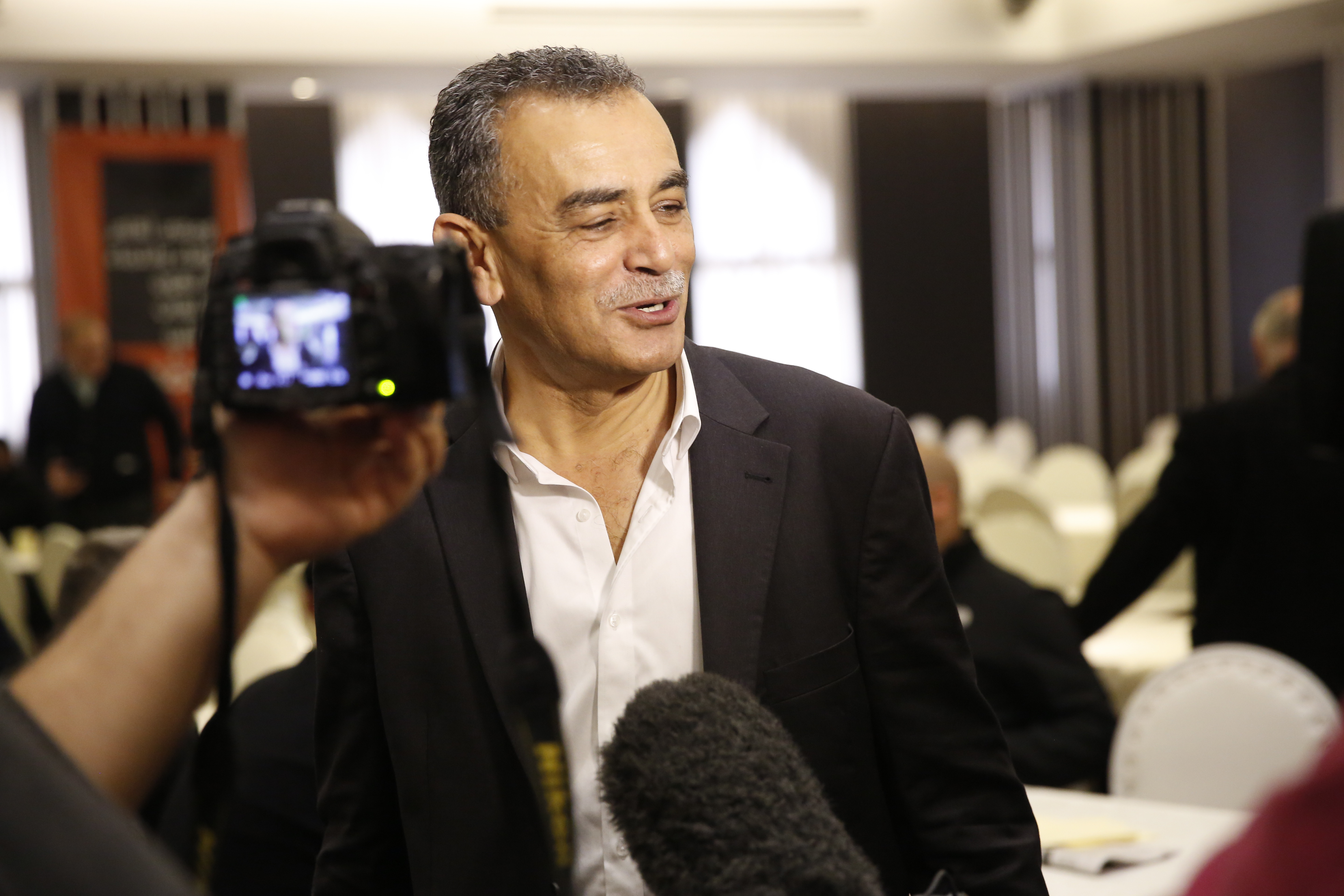 גמאל זחאלקה